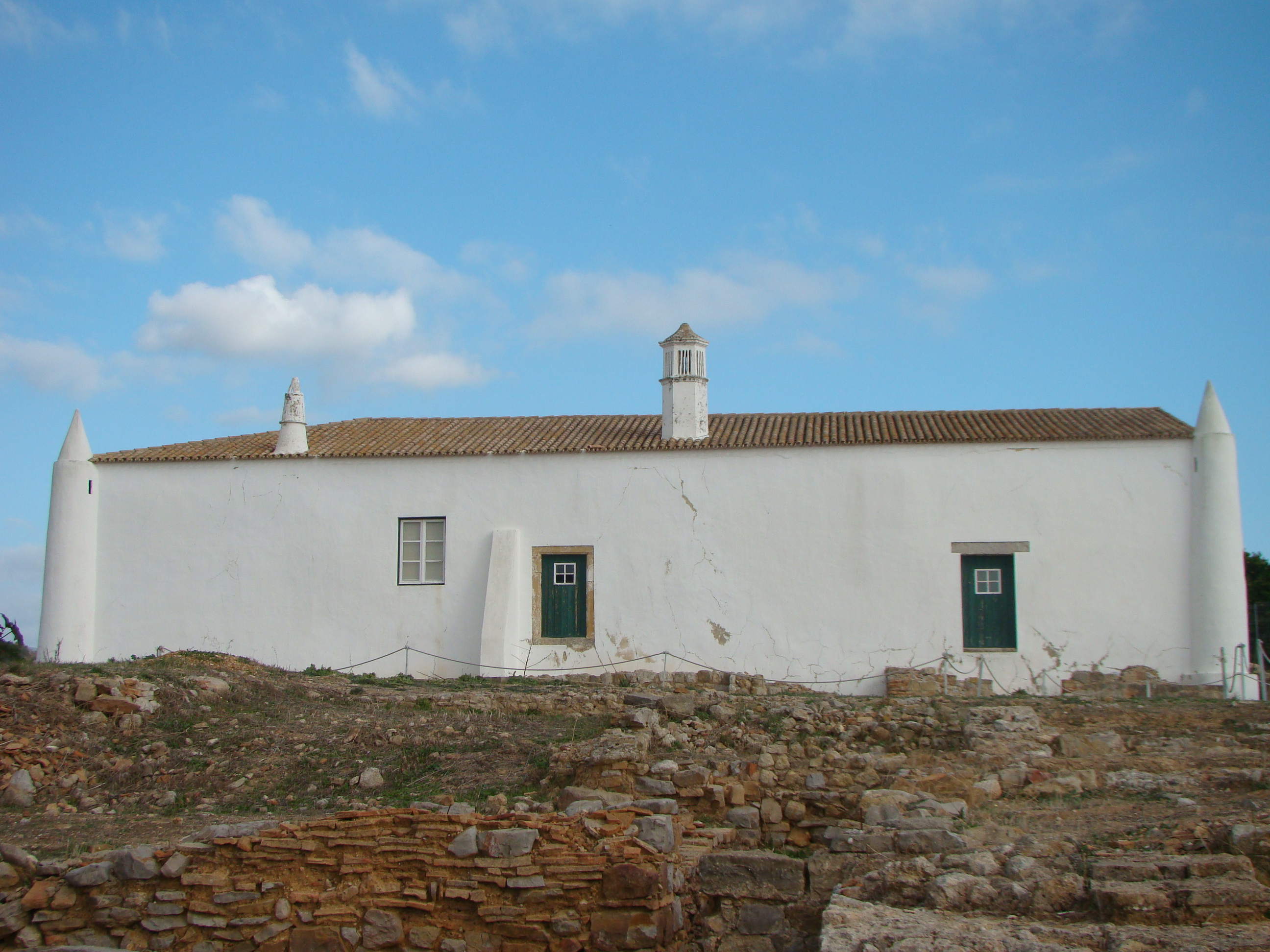 Ruínas Romanas de Milreu - Casa rural - 15.11.2017.